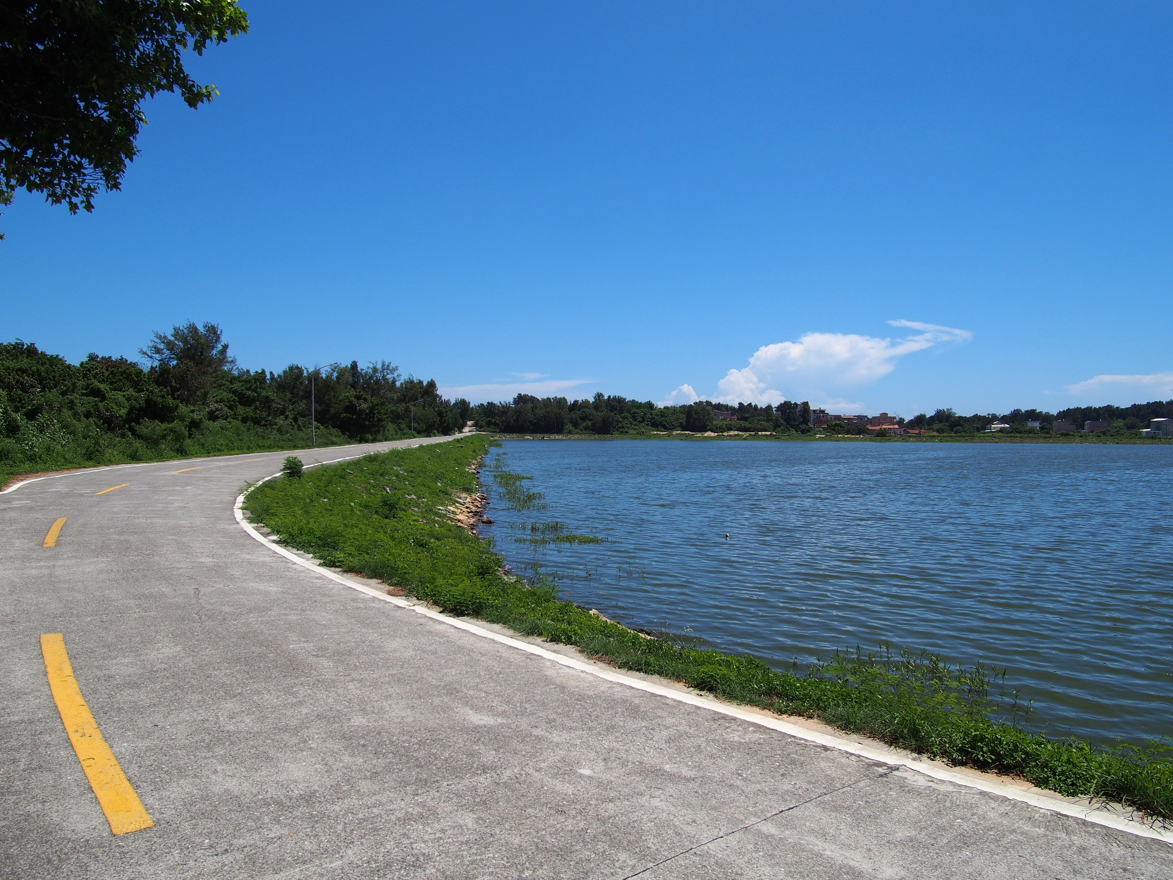 田埔水库 - Tianbu Reservoir - 2014.09